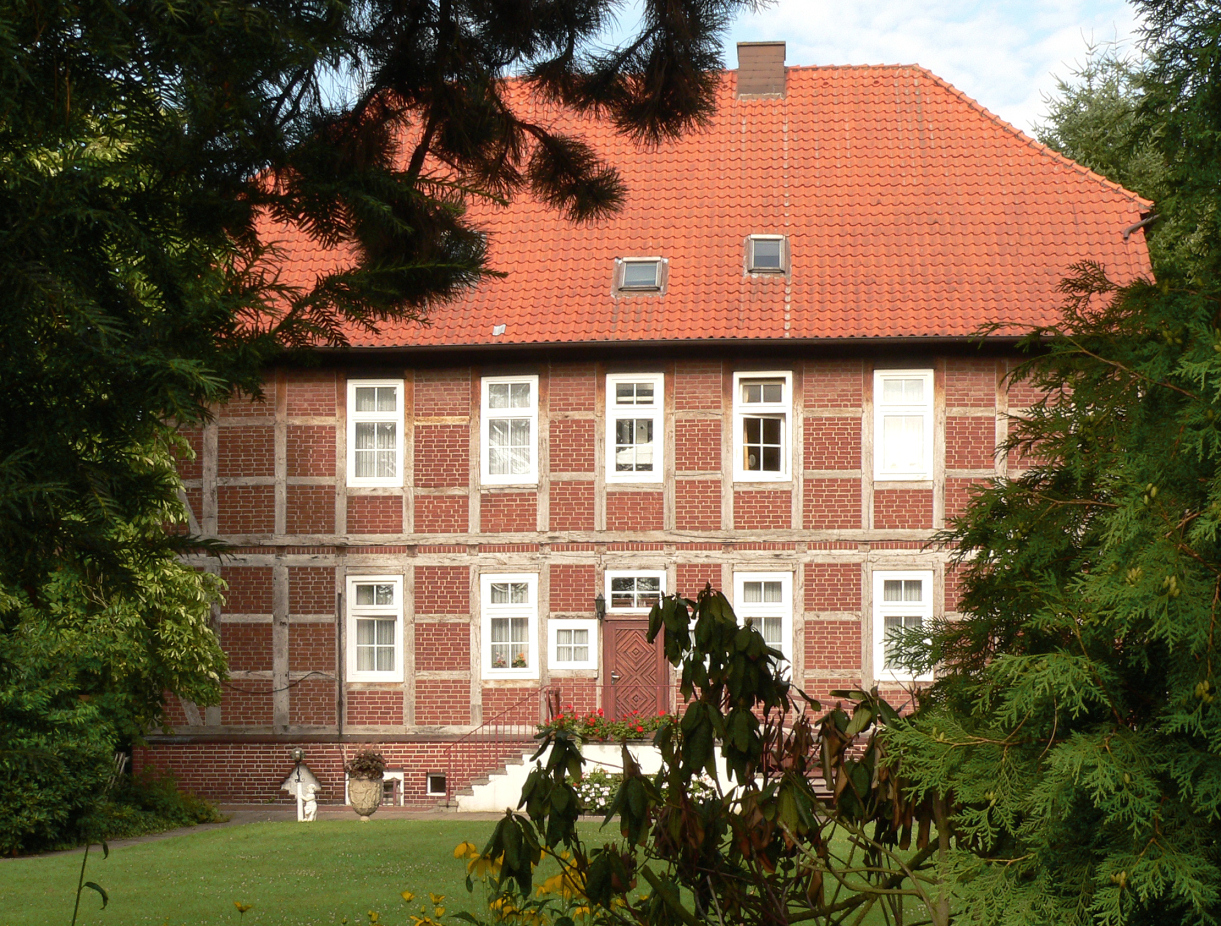 Früheres Forsthaus, 1779 aus dem Material des Pagenhauses an der Stelle des Pagenhauses als zweigeschossiges Gebäude für den Förster errichtet, heute Altenheim